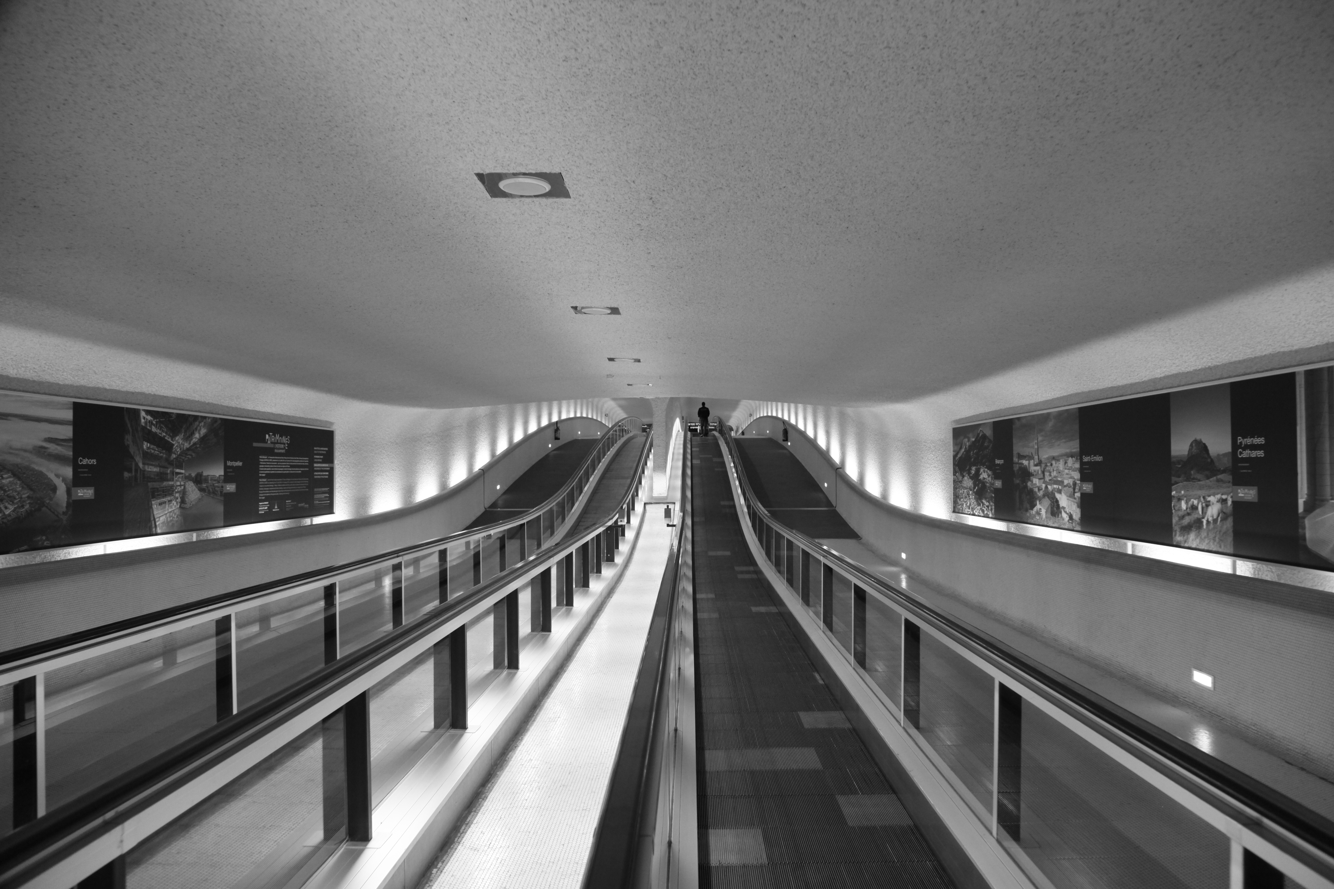 Paris-Charles de Gaulle Airport, Terminal 1, Tunnel zu Satellit